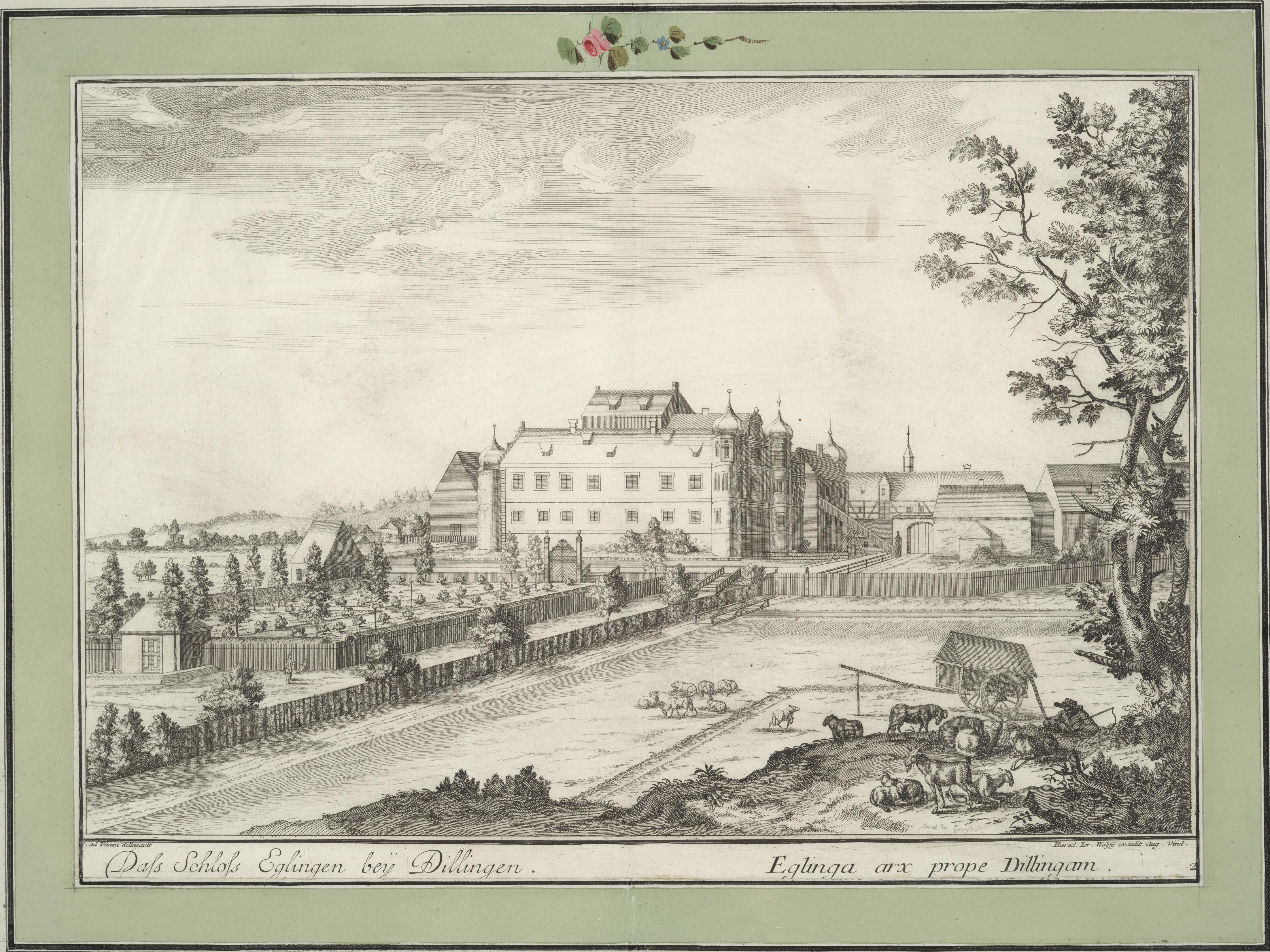 Schloss Eglingen bei Dillingen. Kupferstich, um 1740?, Dass Schloss Eglingen, bey Dillingen = Eglinga arx prope Dillingam / SC. ad Vivum delineavit. Haered Ier. Wolffy excud. - Aug[ustae] Vind[elicorum], [ca. 1740?]. Kupferst. 50 x 34 cm, um 1740?